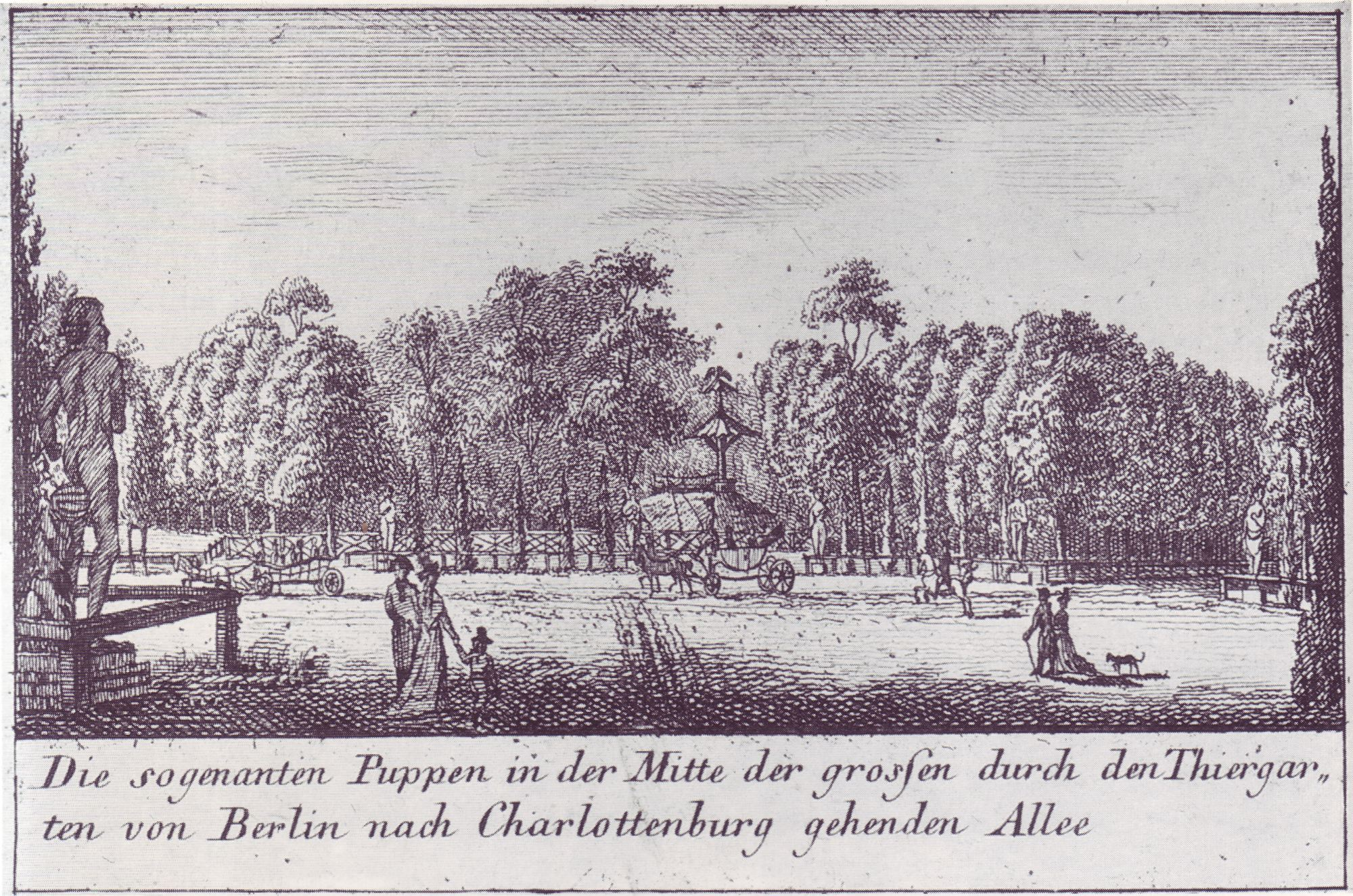 "Die sogenannten Puppen in der Mitte der groszen durch den Thiergarten von Berlin nach Charlottenburg gehenden Allee", showing Großer Stern in Tiergarten park in Berlin with sculptures in 1796